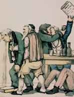 Artur Bartels (1818-1885), Urzędnicy w karczmie